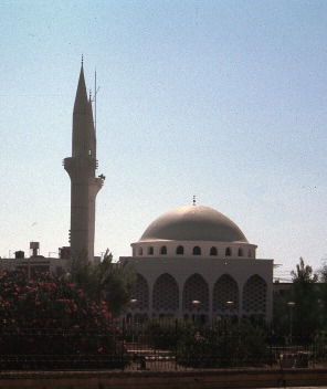 Neue Moschee in Guzelyurt